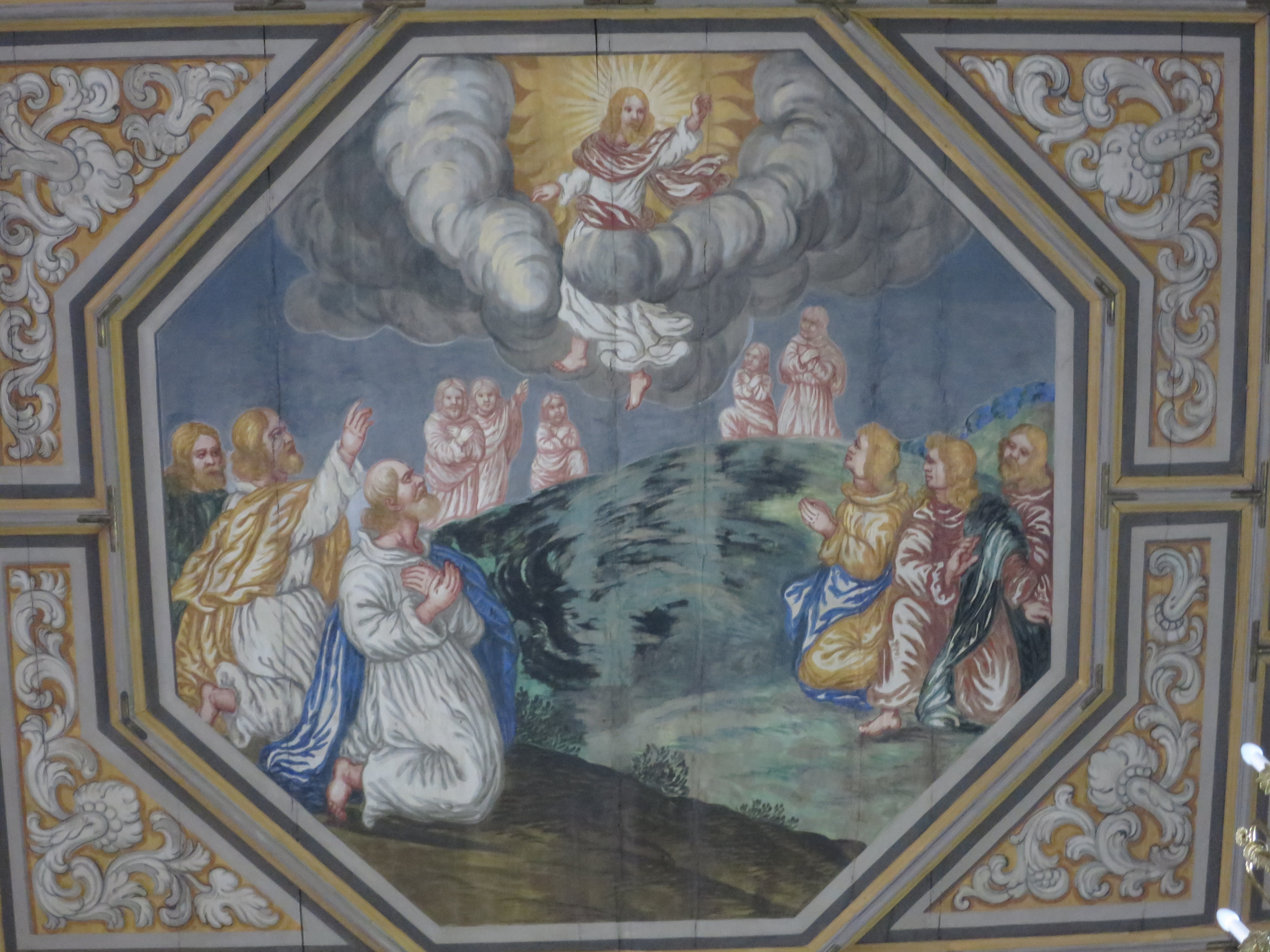 Deckenbemalung von J. Hauffen (Himmelfahrt)